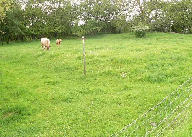 Platz der Königspfalz Dahlum